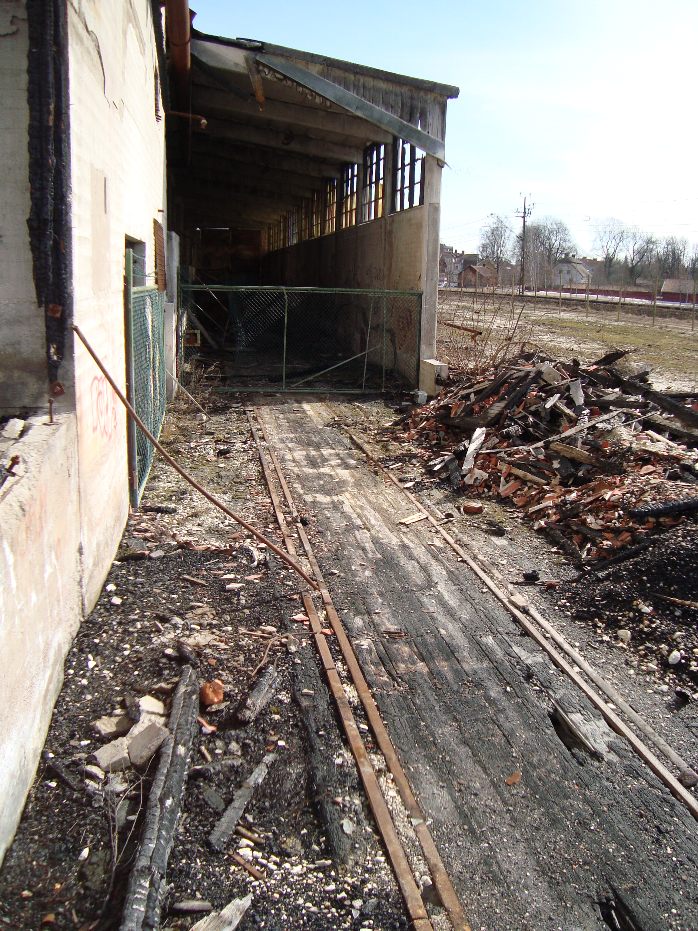 Strå kalkbruk, Sala, Sverige